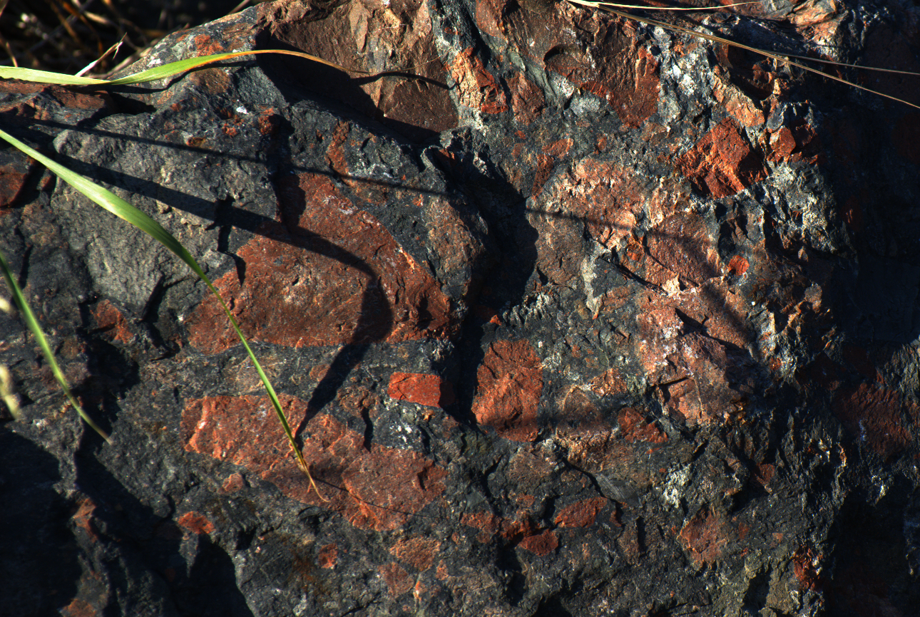 Vulkangestein mit eingelegten Gesteinstrümmern, Findlinge vor dem Haus Ursee im Urseetal, „Lenzkircher Bierschinken“